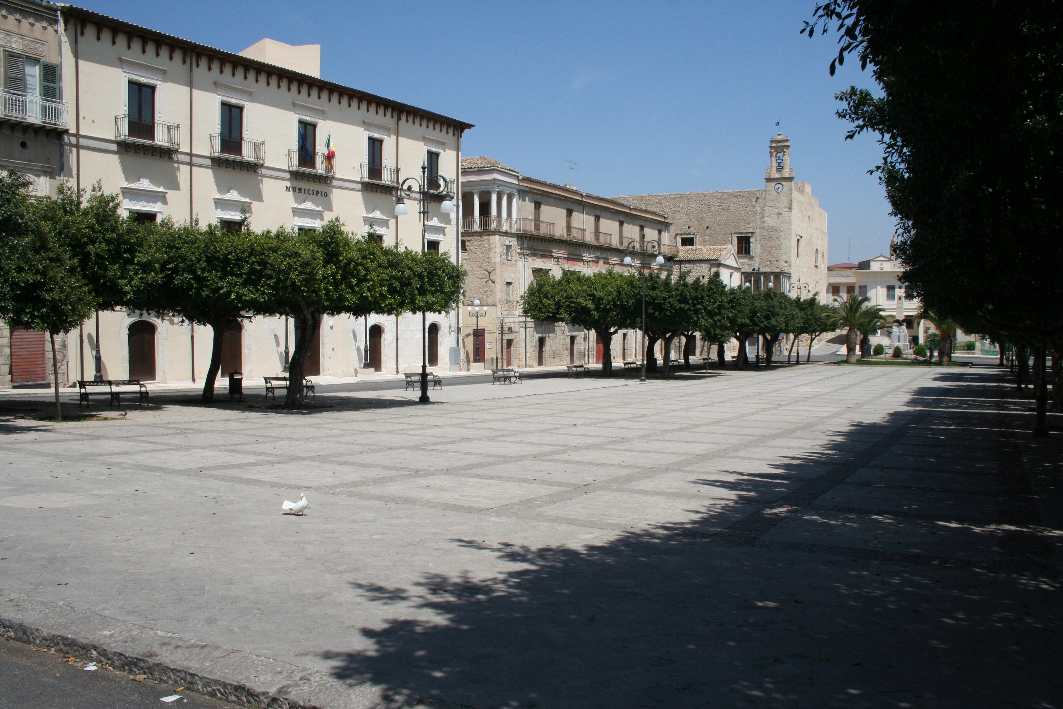 Favara